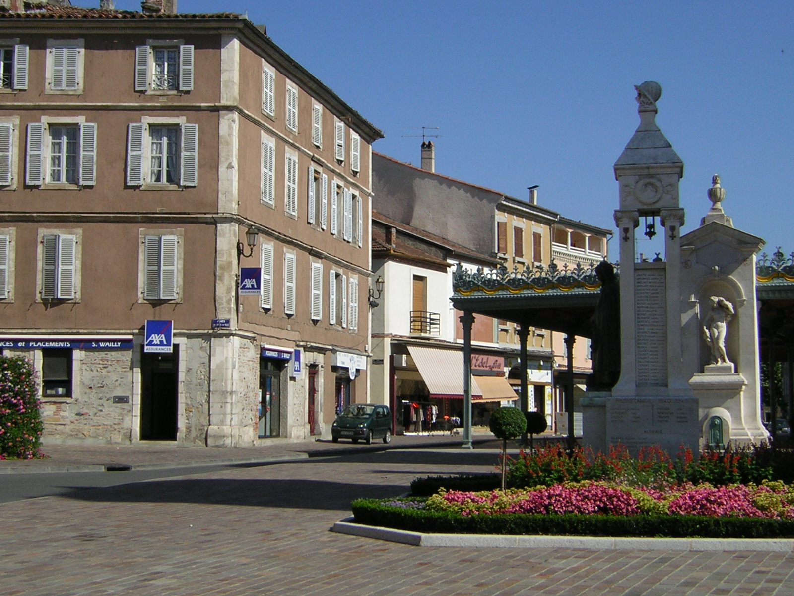 Cazères